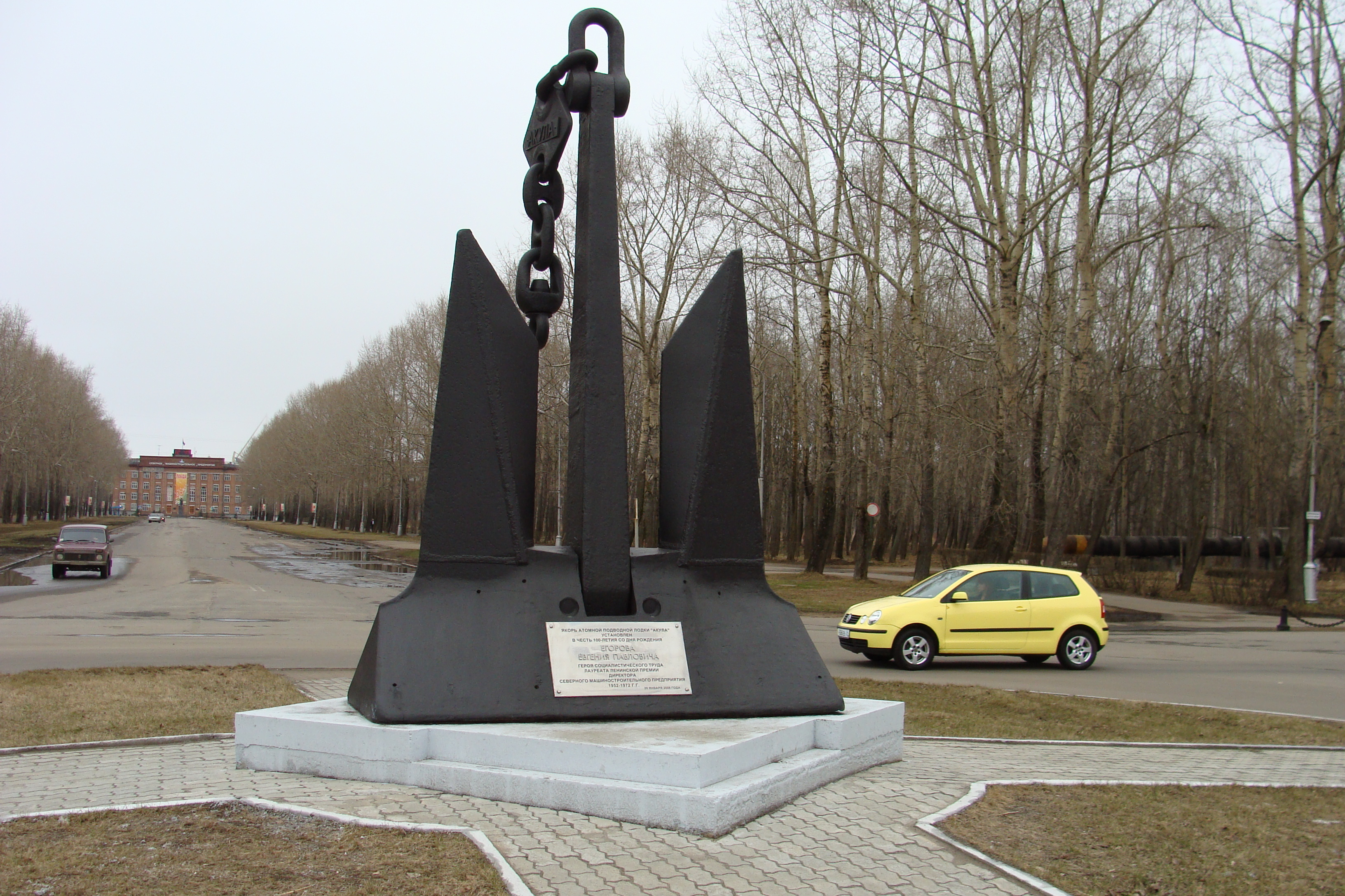 Надпись на табличке прикреплённой на якоре: "ЯКОРЬ АТОМНОЙ ПОДВОДНОЙ ЛОДКИ "АКУЛА" УСТАНОВЛЕН В ЧЕСТЬ 100-ЛЕТИЯ СО ДНЯ РОЖДЕНИЯ ЕГОРОВА ЕВГЕНИЯ ПАВЛОВИЧА, ГЕРОЯ СОЦИАЛИСТИЧЕСКОГО ТРУДА, ЛАУРЕАТА ЛЕНИНСКОЙ ПРЕМИИ, ДИРЕКТОРА СЕВЕРНОГО МАШИНОСТРОИТЕЛЬНОГО ПРЕДПРИЯТИЯ 1952-1972 Г.Г., 20 ЯНВАРЯ 2008 ГОДА" (на заднем плане слева здание заводоуправления ОАО «ПО «Севмаш»).